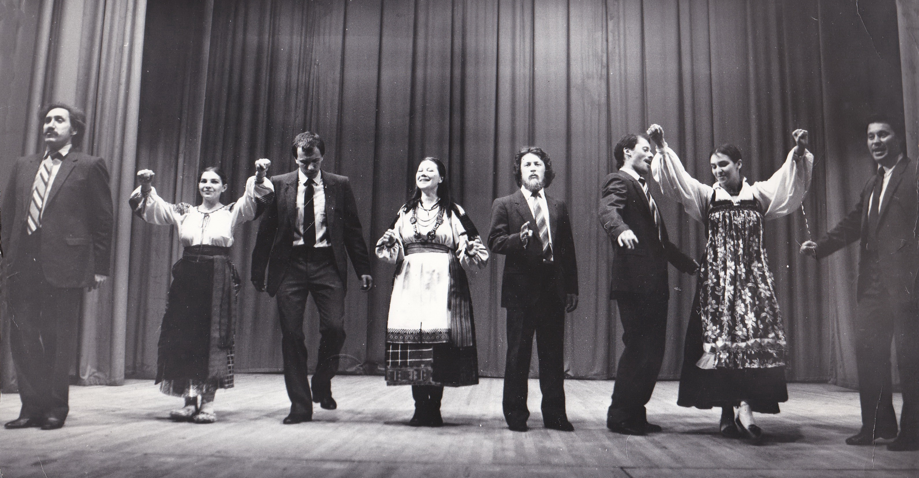 Концертное выступление ансамбля Дмитрия Покровского в 1989 году.